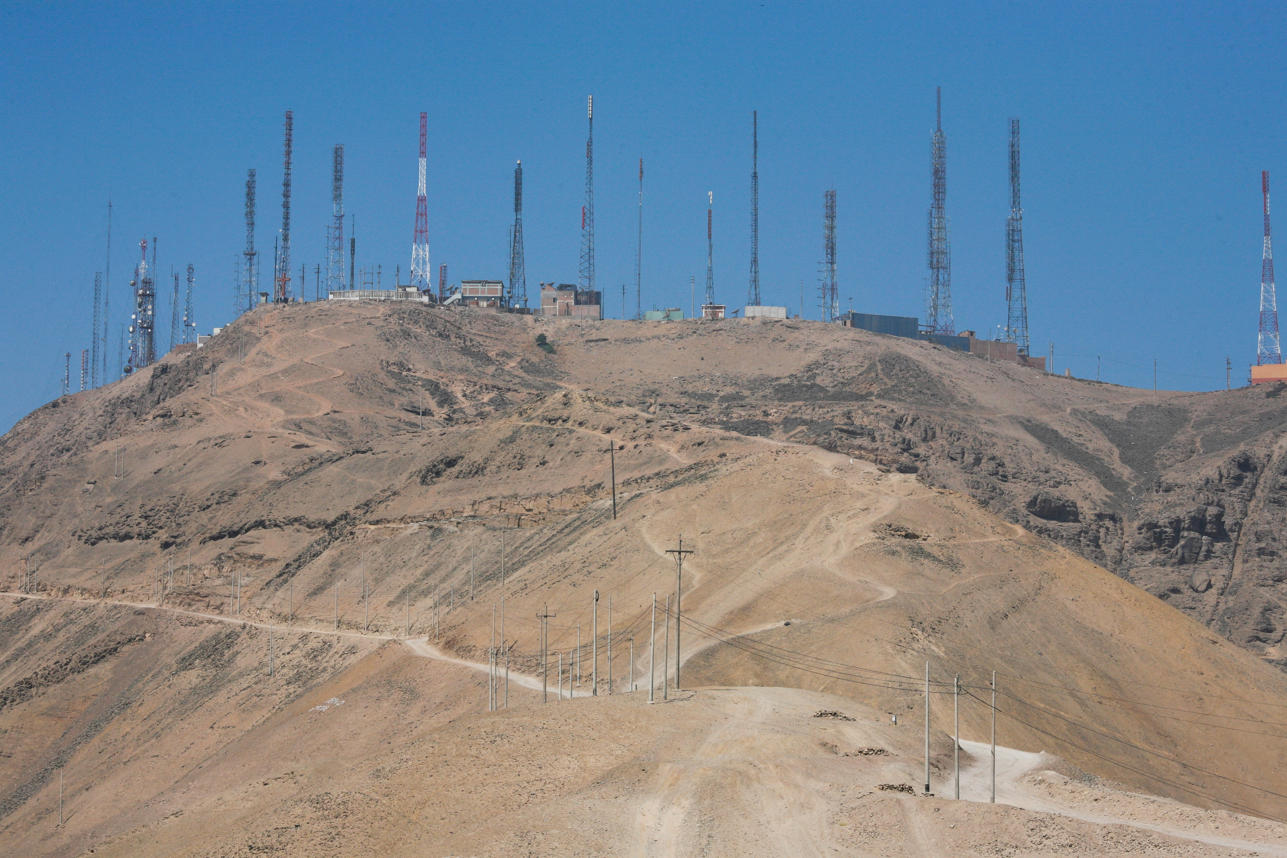 Morro Solar en 2012